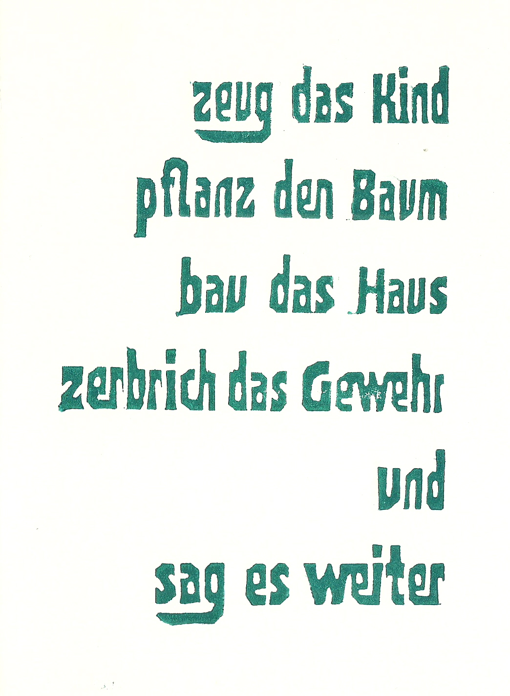 Plepelićs Gedicht „Sag es weiter“, Original aus der Kreuzberger Handwerkstatt.